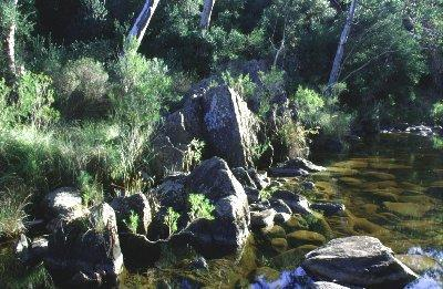 Onkaparinga Gorge